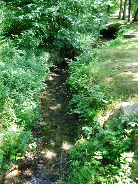 Le ruisseau la Prédecelle à Limours (91)